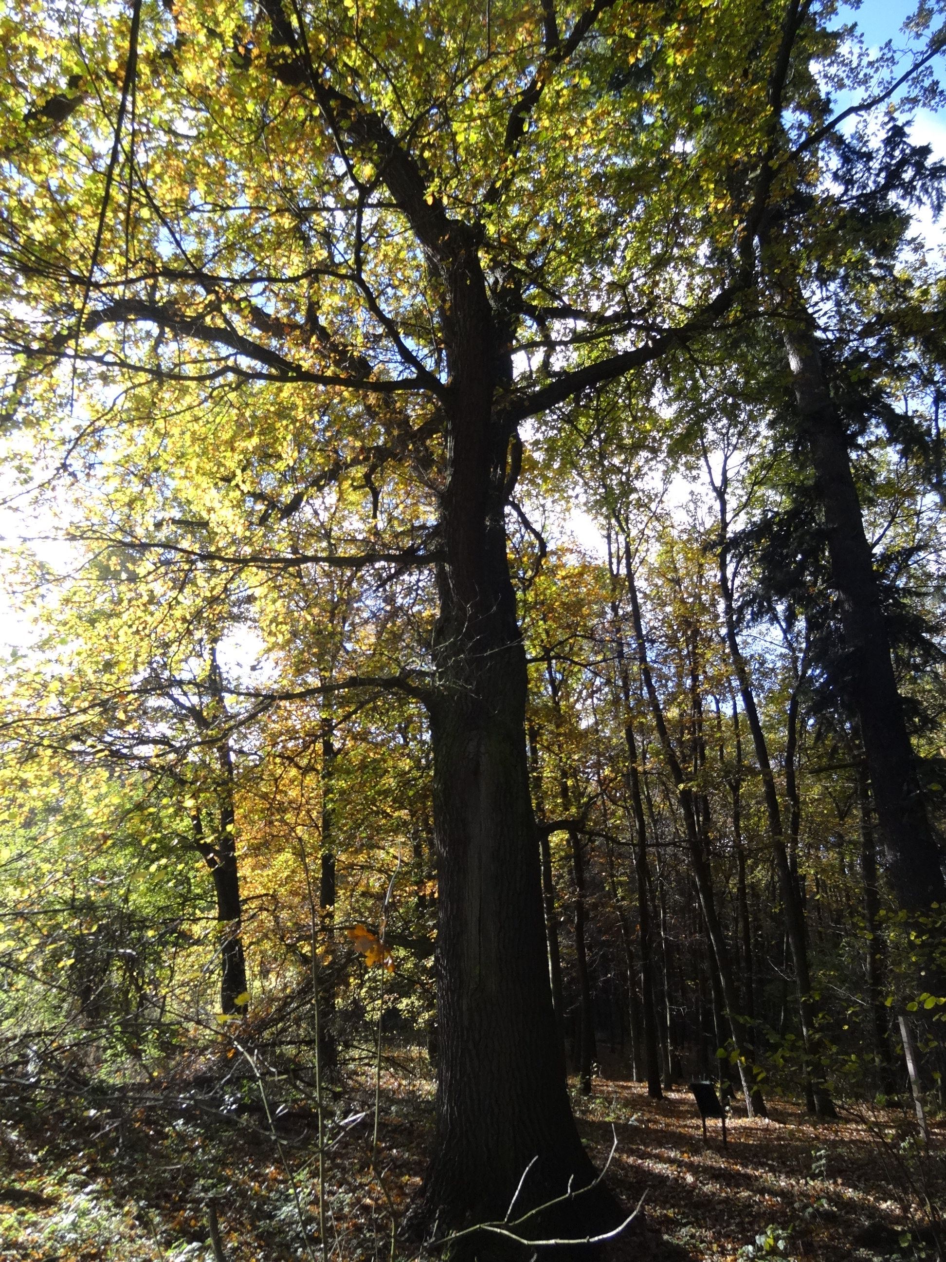 Točná - památný dub letní na okraji lesa pod Nouzovem